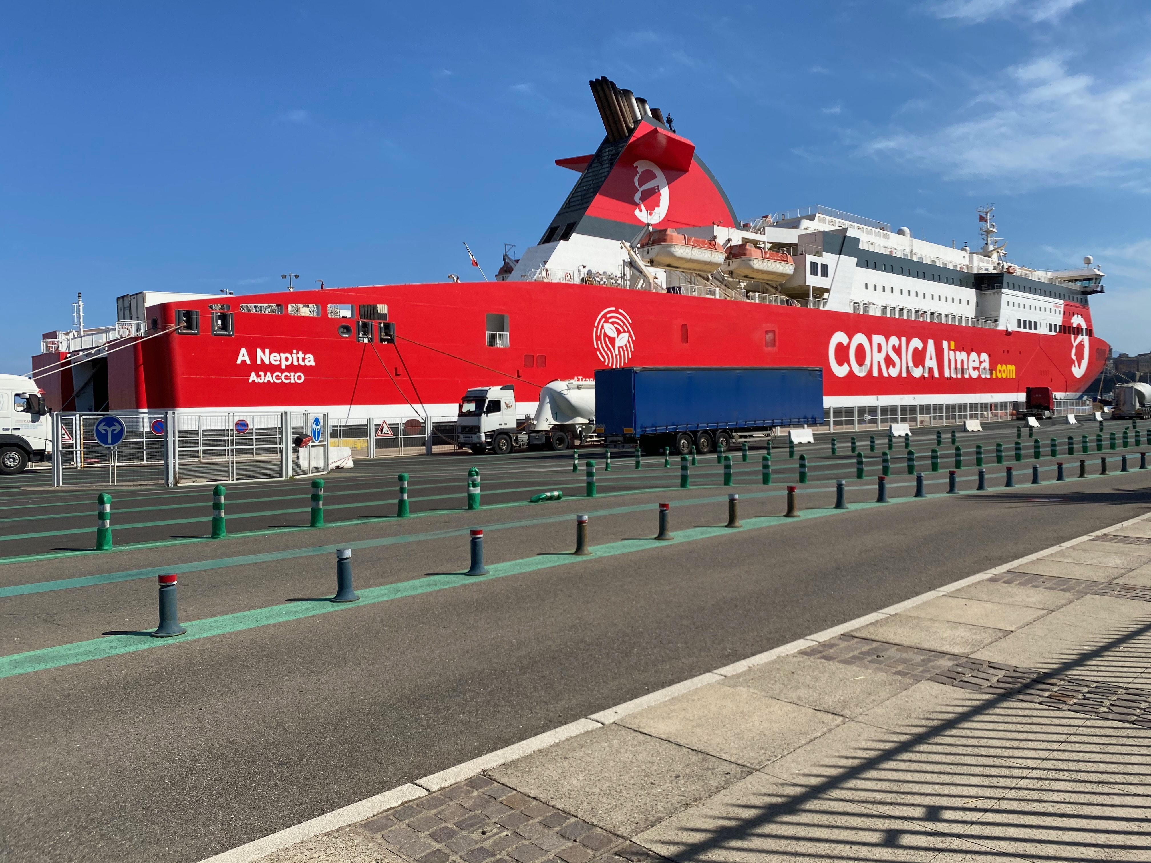 Navire A Nepita de la compagnie Corsica Linea à Bastia en juillet 2020.